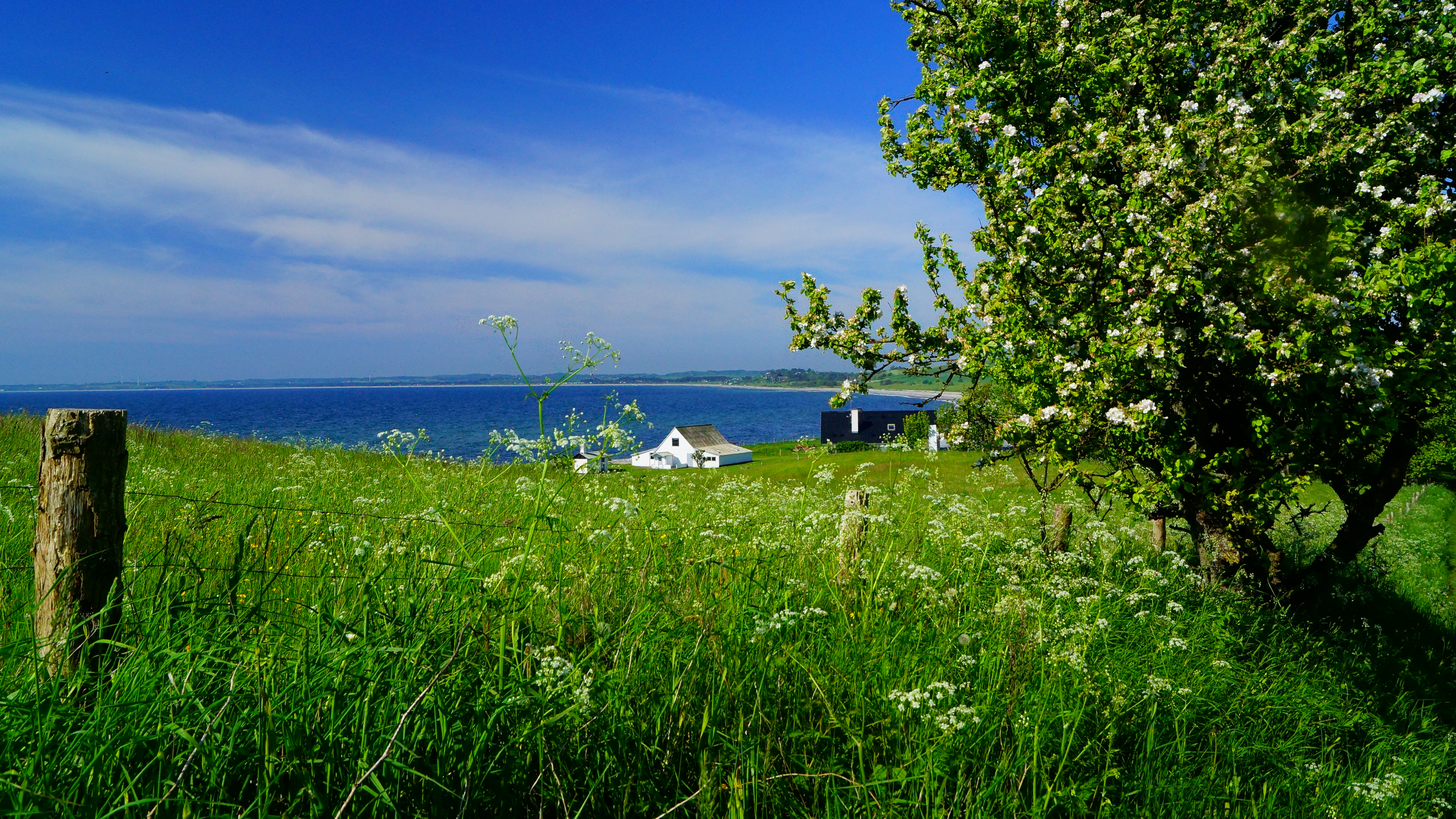 Jernhatten, Dråby Bugt, udsigt fra stien op til toppen